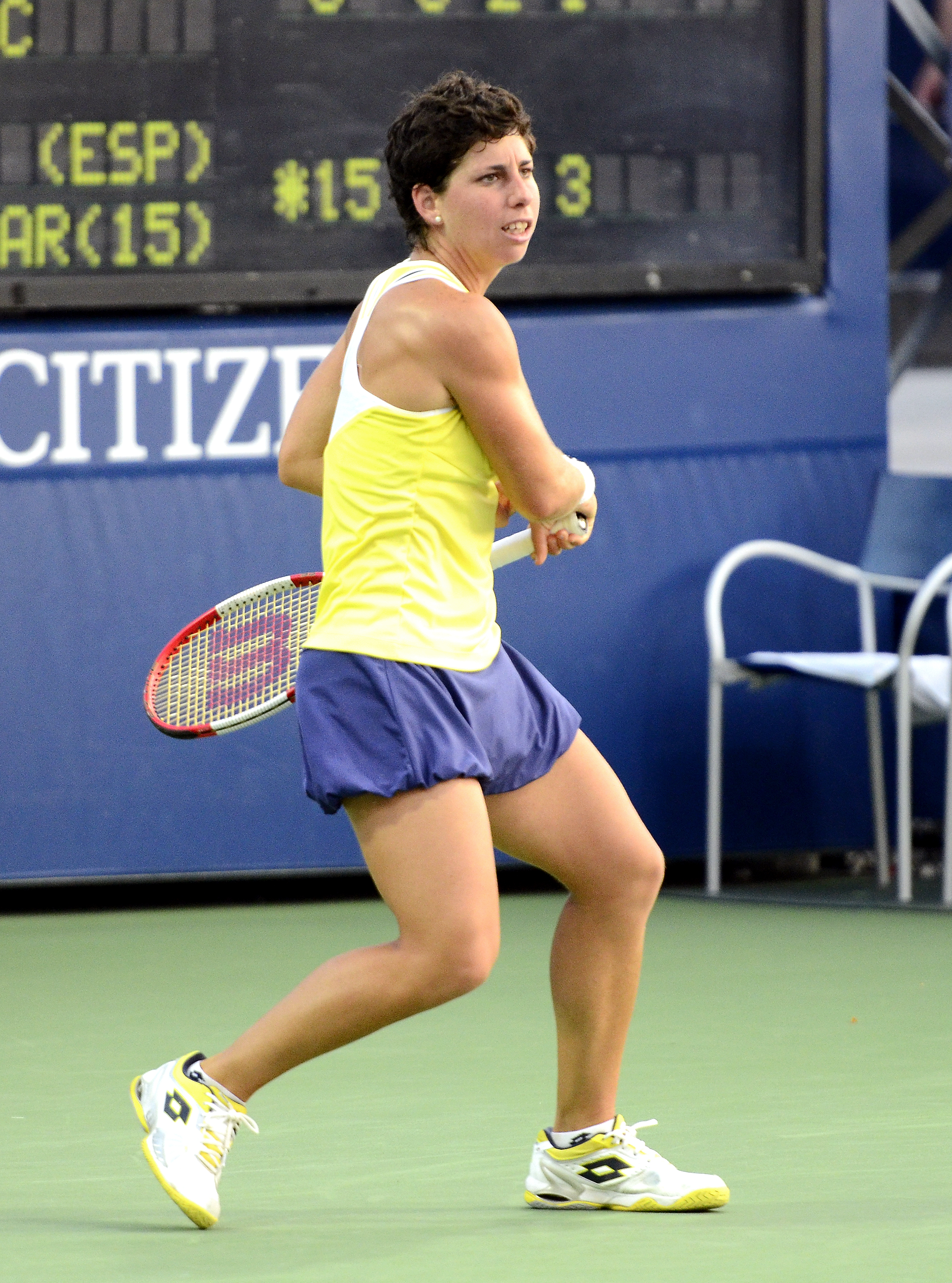 August 26, 2014 Queens, NY Carla Suarez Navarro (ESP) def. Ajla Tomljanovic (AUS)